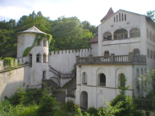 Stari grad Bosiljevo